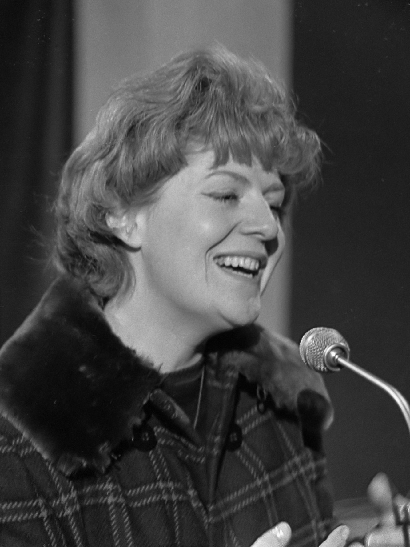 Repetitie TV-programma "Domino" in Marcanti. Simone Langlois 24 januari 1963